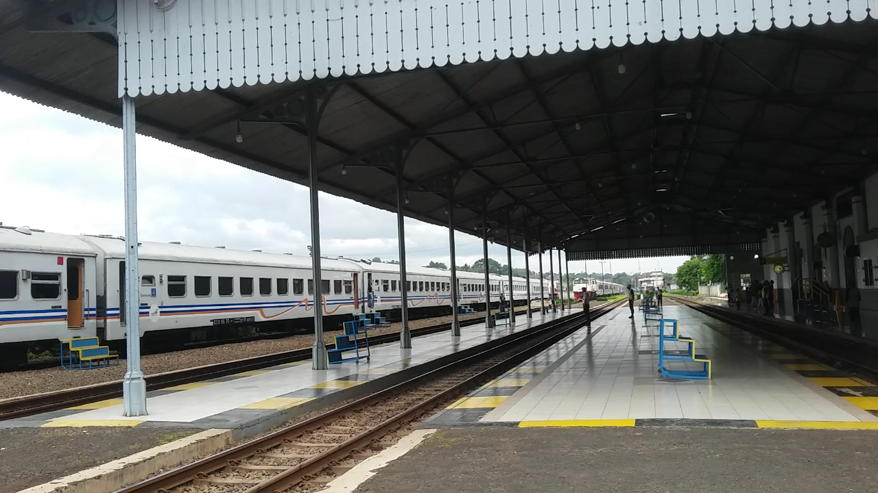 KA lokal Bandung Raya bersilang dengan KA Argo Parahyangan di stasiun Padalarang